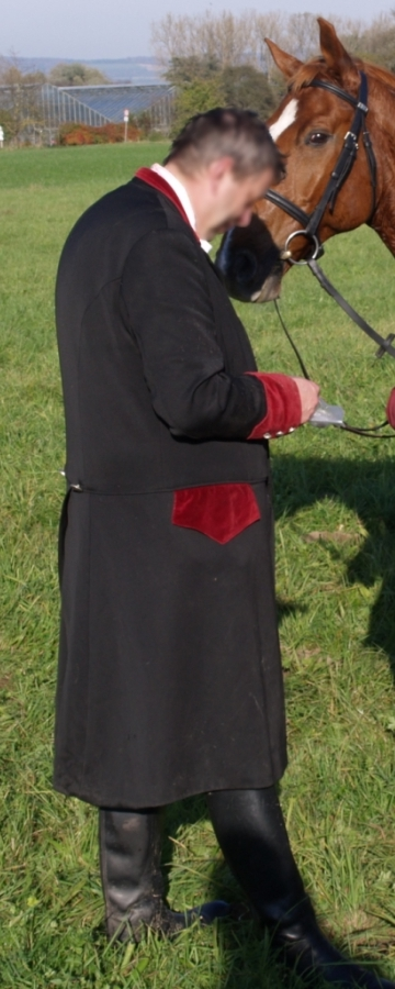 Jagdrock, Master verteilt Meutenknöpfe nach Reitjagd